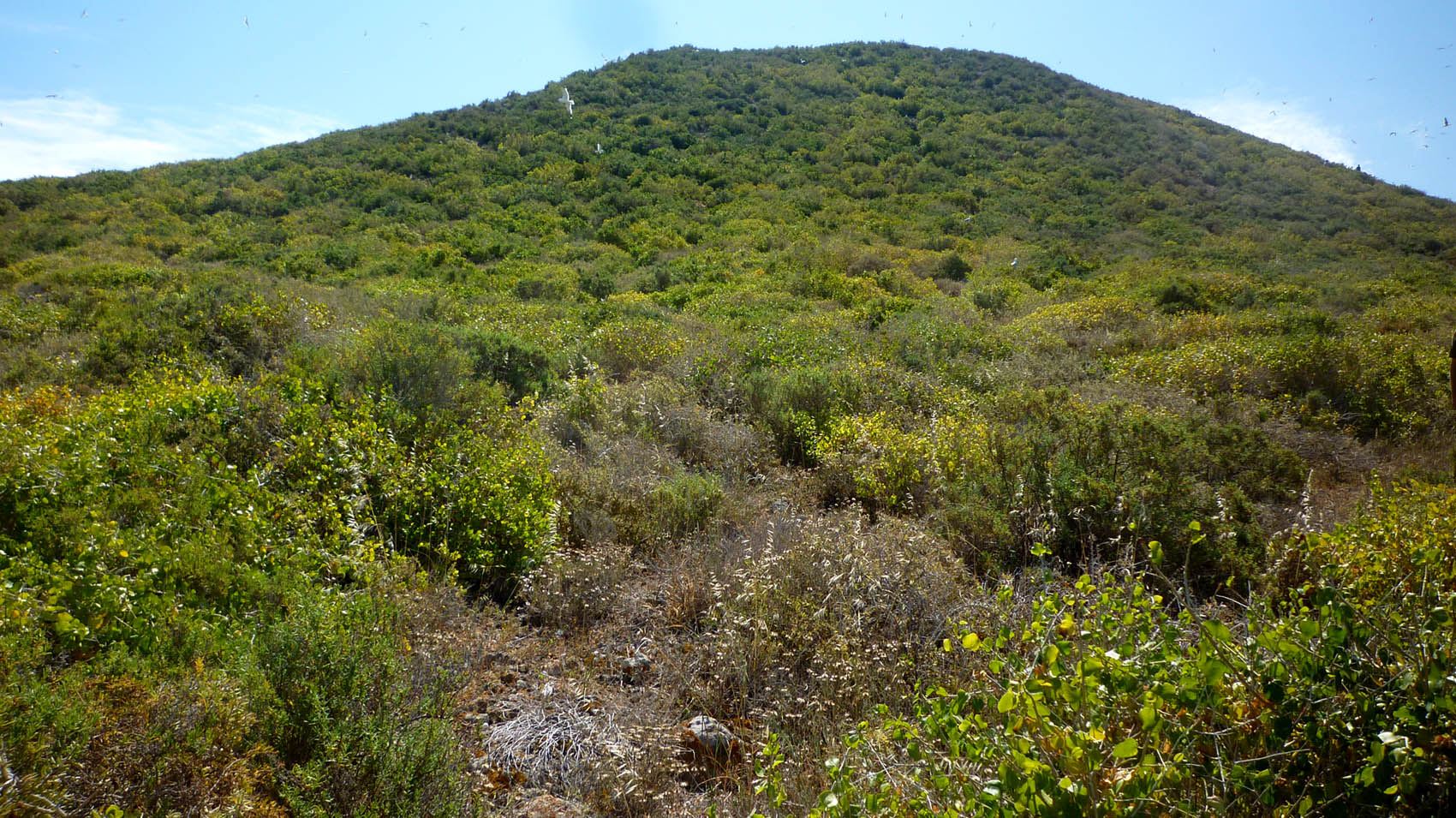 Matorral de oroval (Withania frutescens) en Isla Grosa (Región de Murcia, España).